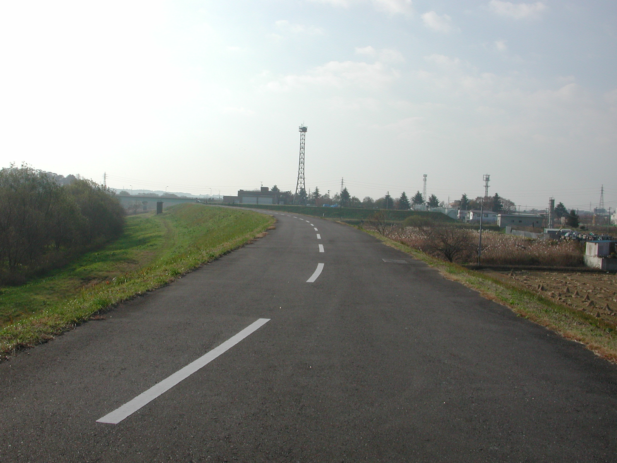 mitinokuzitensyadou